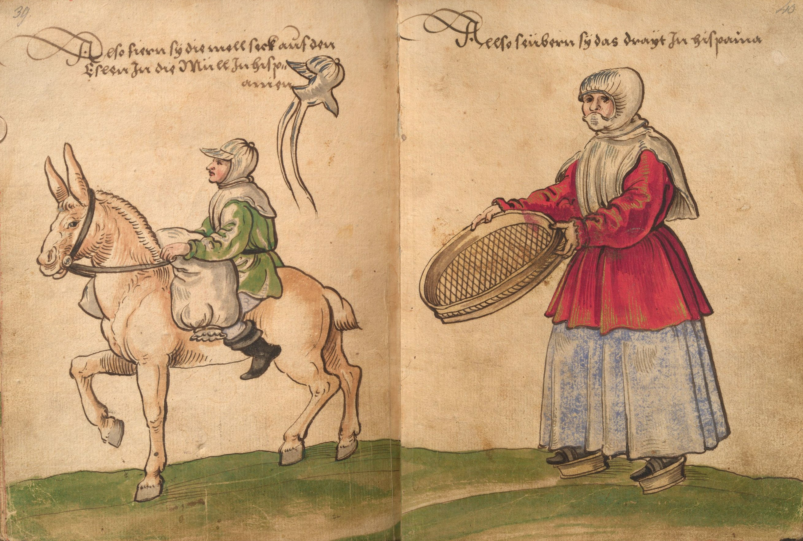 "Trachtenbuch" des Christoph Weiditz, Germanisches Nationalmuseum Nürnberg, Hs. 22474. Bl. 39-40 Wie in Spanien Korn und Mehl transportiert wird / Wie man in Spanien das Getreide säubert